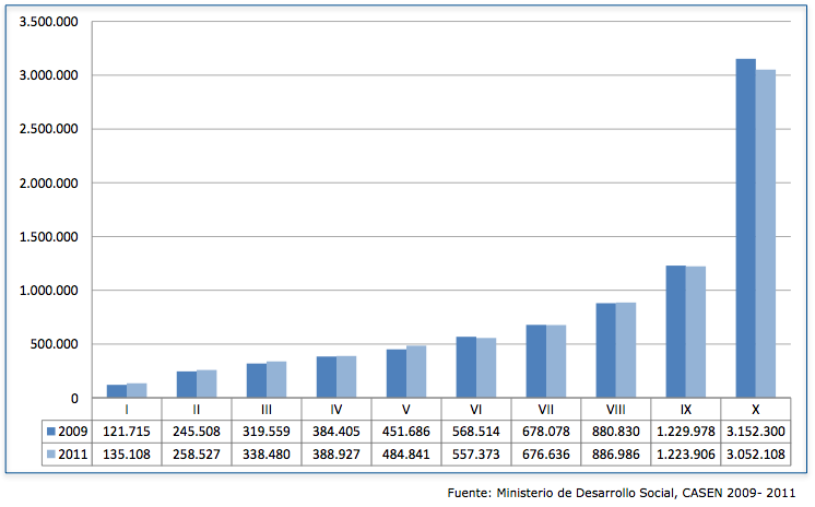 Ingreso monetario promedio por deciles de Chile